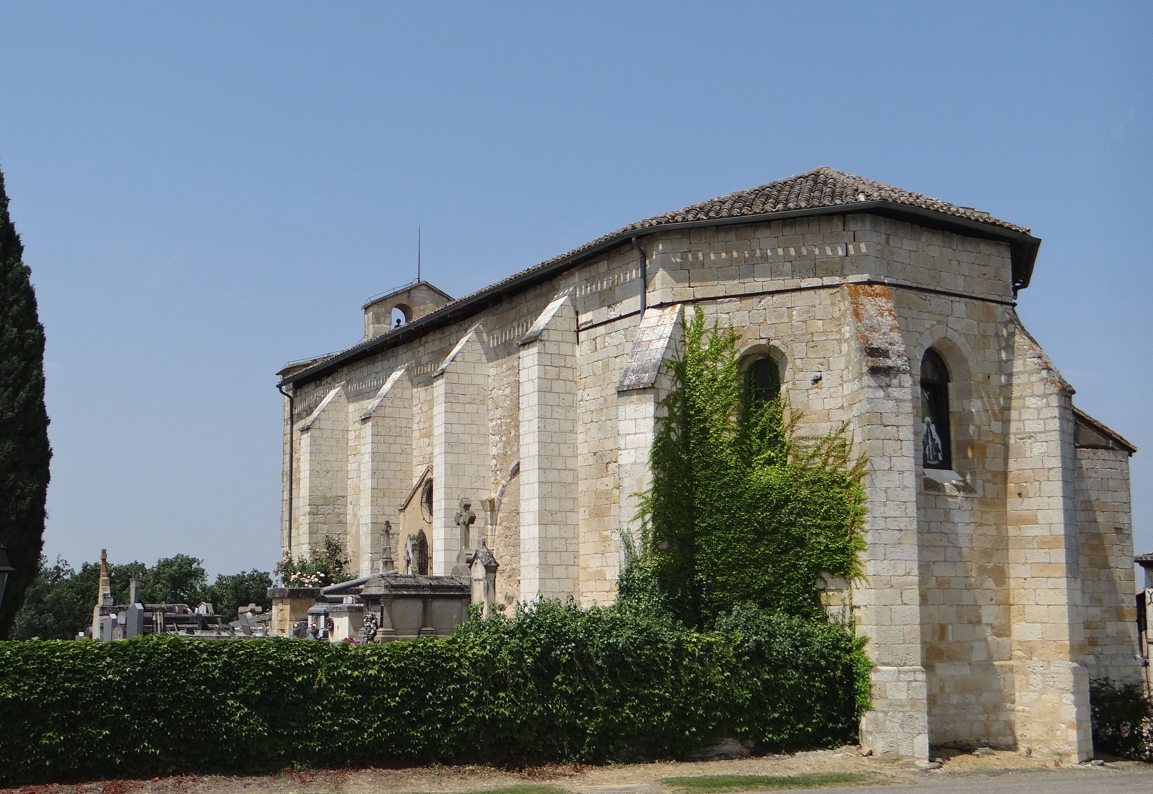 Castéra-Bouzet - Église Saint-Barthélemy - Chevet